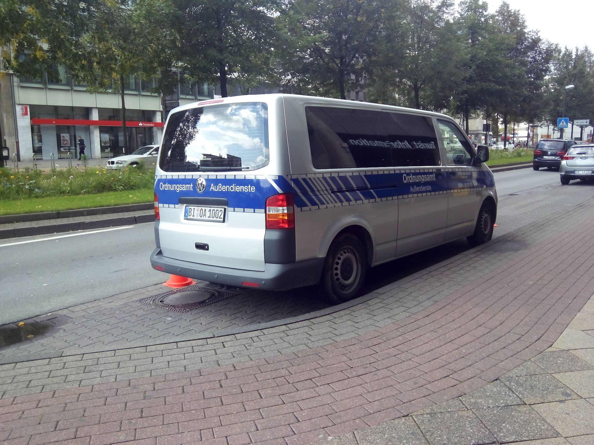 Fahrzeug des Ordnungsamtes der Stadt Bielefeld